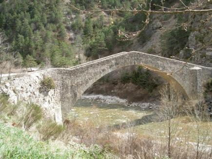 Pont de la reine Jeanne sur le Coulomp à Saint-Benoît - Alpes-de-Haute-Provence